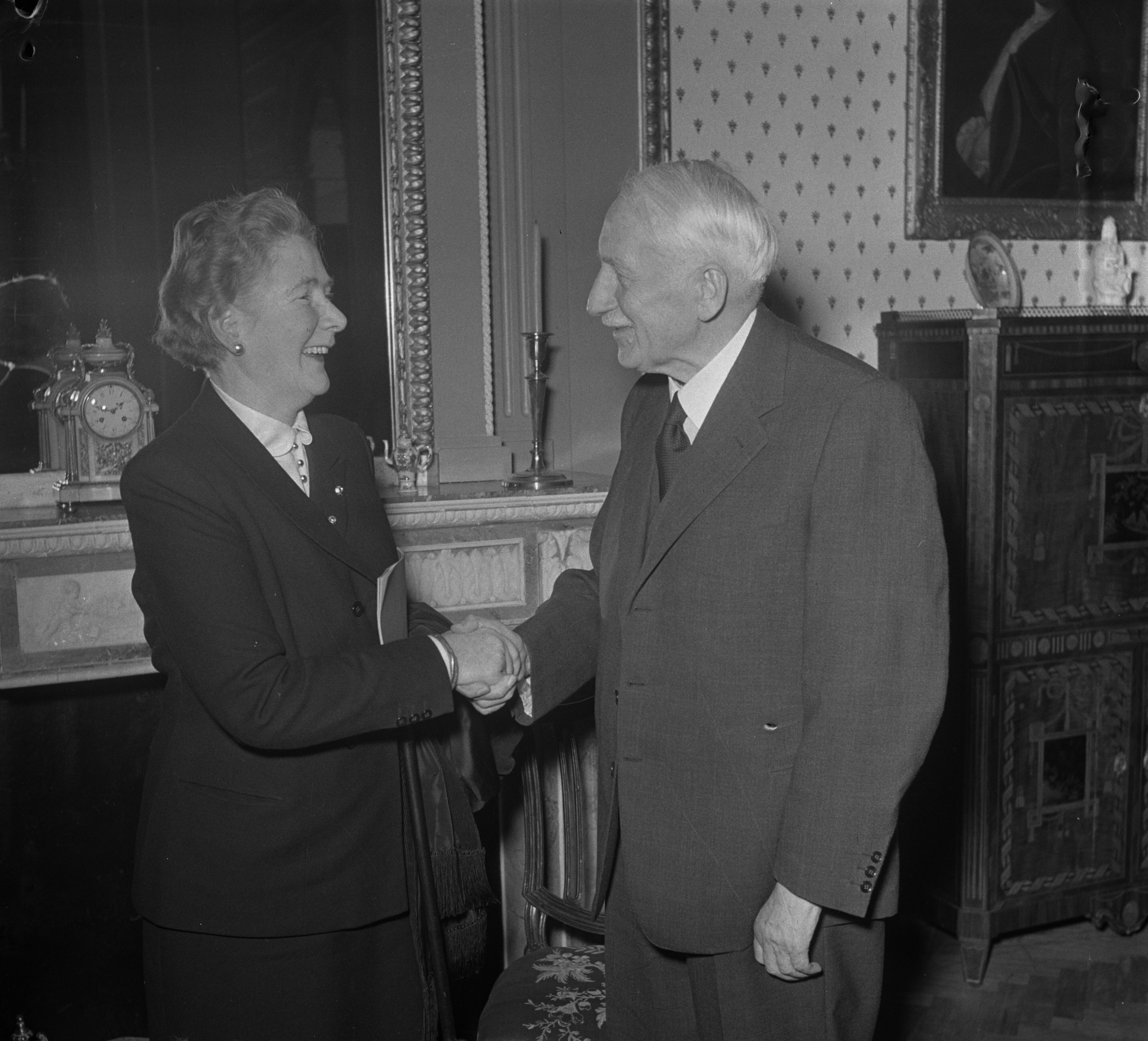 Collectie / Archief : Fotocollectie Anefo Reportage / Serie : [ onbekend ] Beschrijving : Prijsuitreiking Kunsten verzet Charlotte Toorop en Maurits Uylders Datum : 24 januari 1953 Trefwoorden : KUNSTEN, Prijsuitreikingen, VERZET Persoonsnaam : Toorop, Charley, Toorop, Charlotte, Uylders, Maurits Fotograaf : Noske, J.D. / Anefo Auteursrechthebbende : Nationaal Archief Materiaalsoort : Negatief (zwart/wit) Nummer archiefinventaris : bekijk toegang 2.24.01.03 Bestanddeelnummer : 905-4995